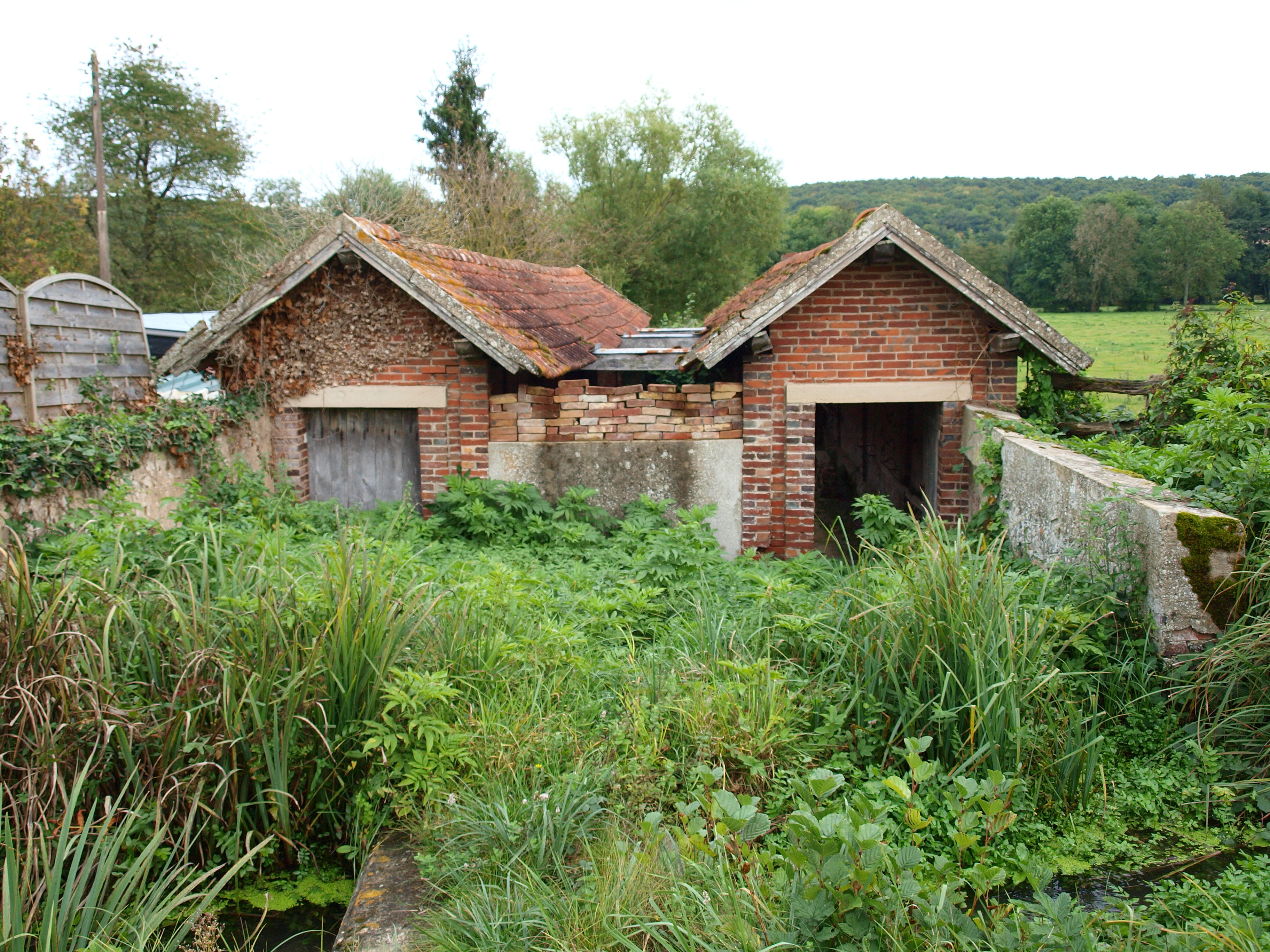 Précy-sur-Vrin (Yonne, France) ; lavoir